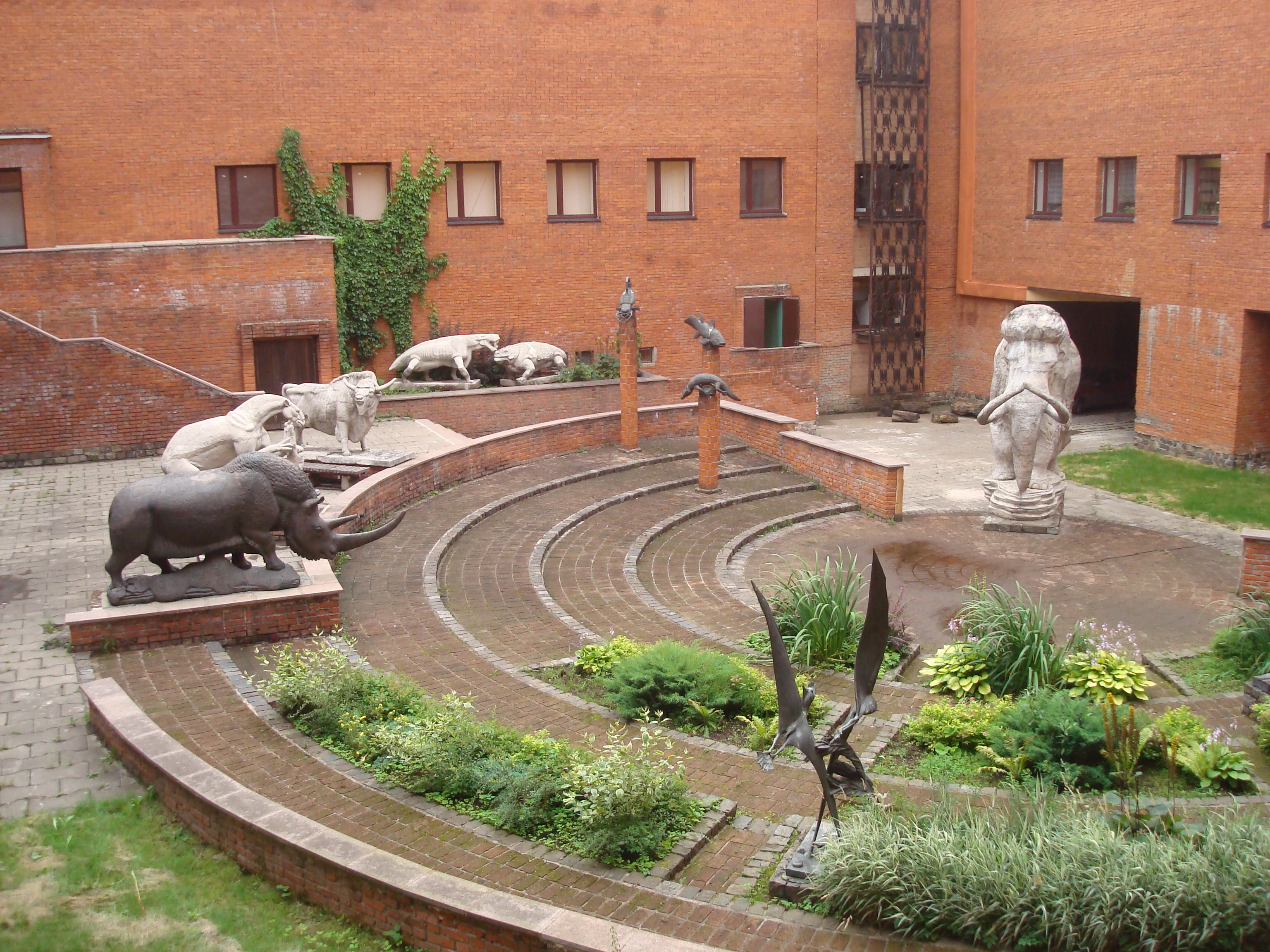 Внутренний дворик палеонтологического музея им. Ю. А. Орлова